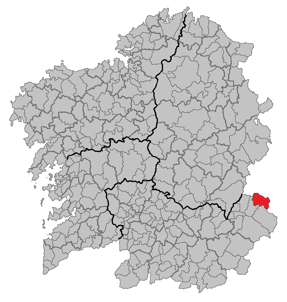 Mapa coa localización do concello de Rubiá.